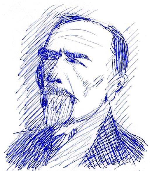 我是这幅画的作者，画于2005年十月，画中人物是波兰裔英国作家约瑟夫·康拉德